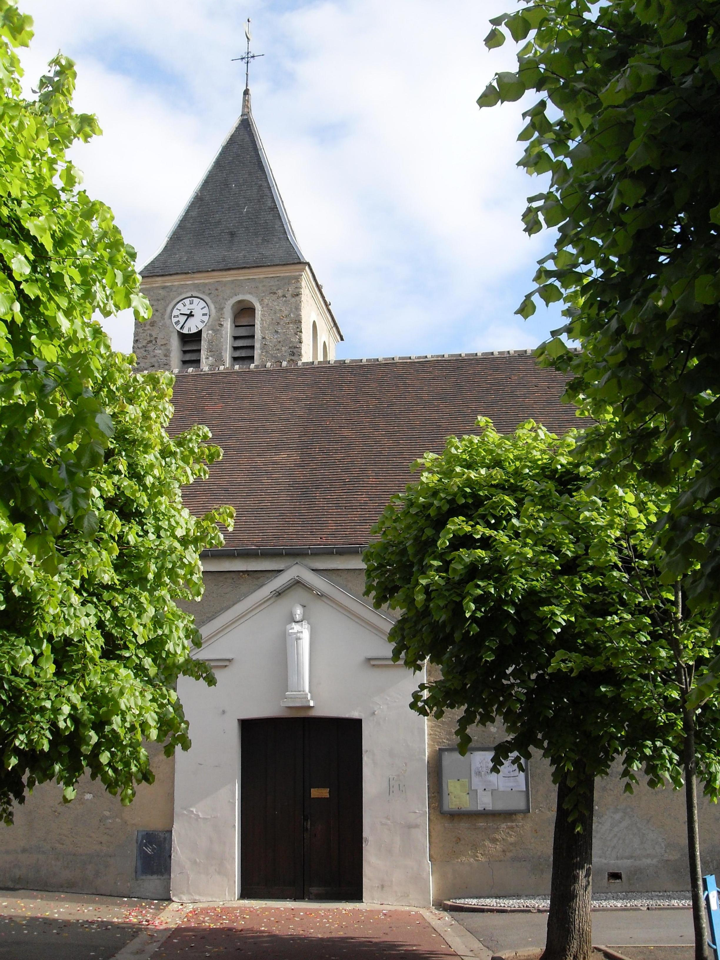 fr: France, Les Clayes sous Bois, Yvelines (78) - l'entrée de l'église Saint-Martin